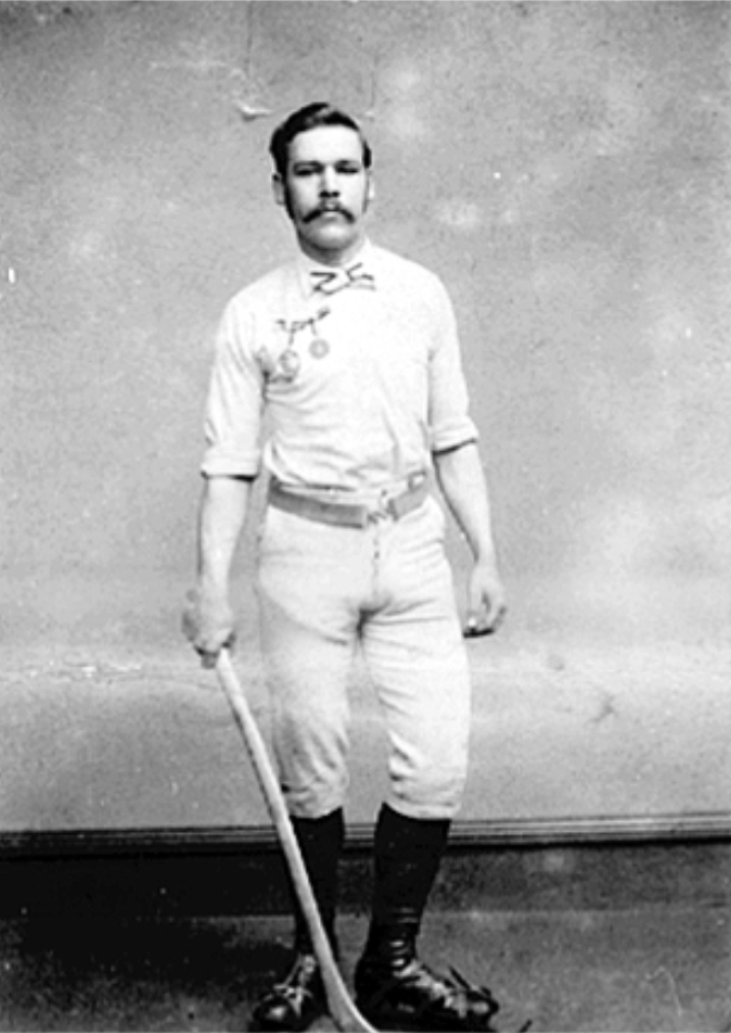 SKØYTELØPER, BANDYSPILLER, CHARLES GOODMAN TEBBUTT, STOCKHOLM